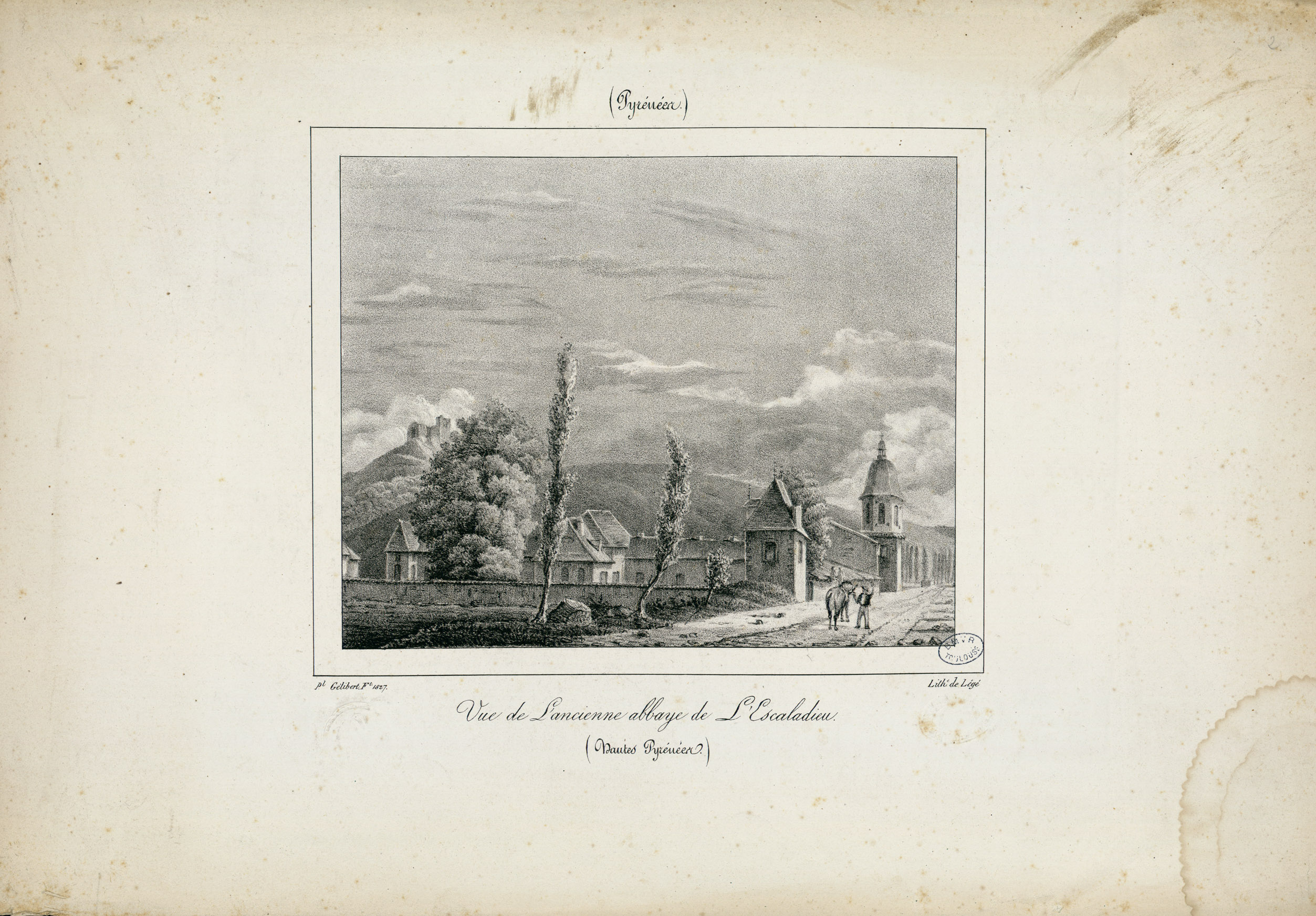 Fait partie d'une série de 42 pl. de Gélibert sur les Pyrénées. Pl. 1 à 11 lith. par Légé (Bordeaux). Pl. 11 à 42 lith. par Engelmann (Paris). Ancely, René (1876 - 1966). Possesseur